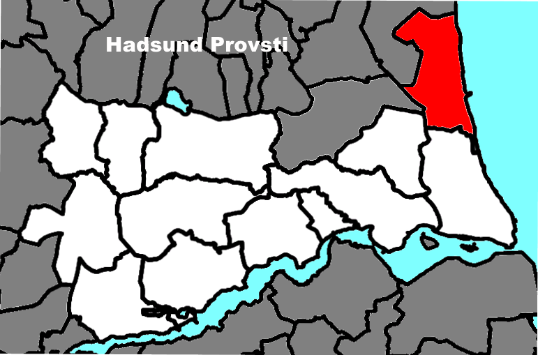 Sognets beliggenhed i Hadsund Provsti.